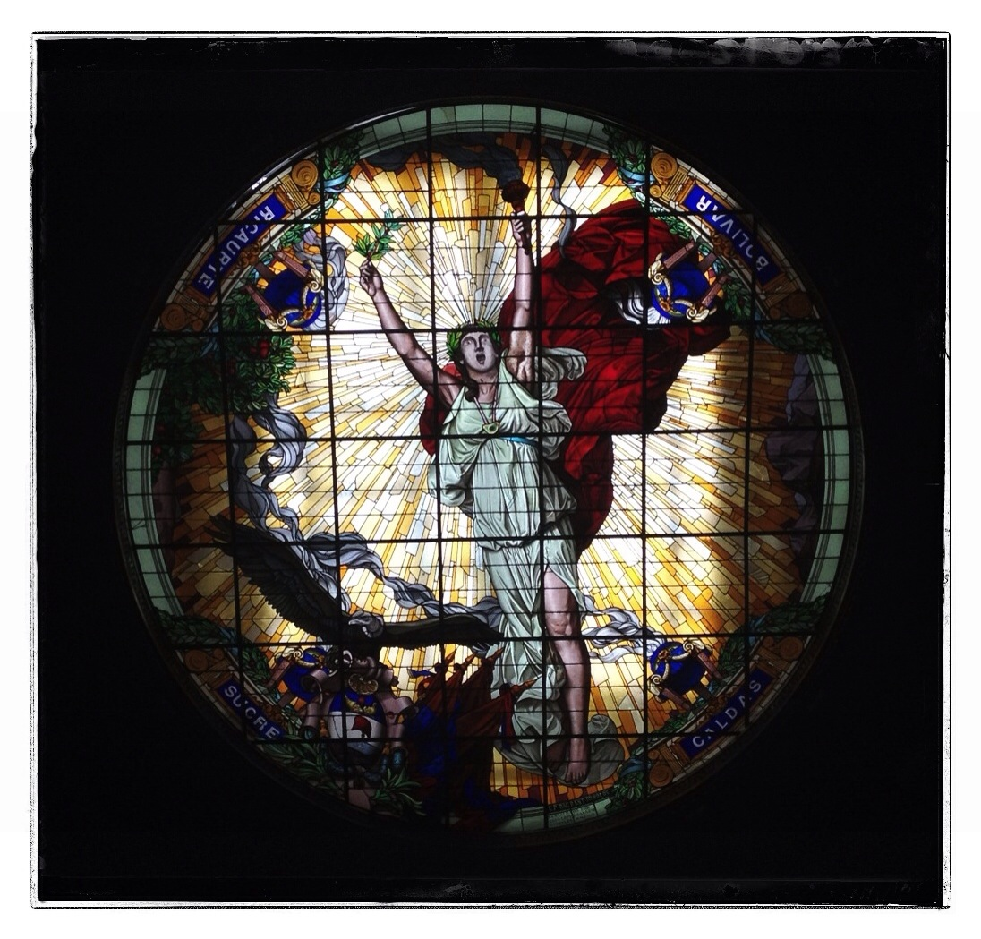 Vitral del Salón Elíptico de la Cámara de Representantes de Colombia